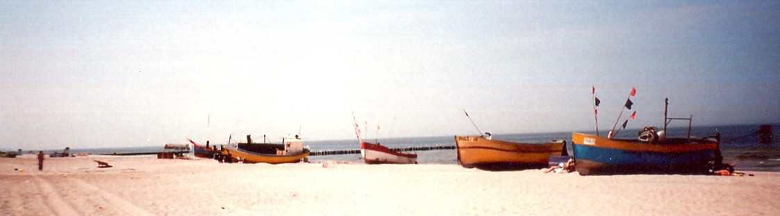 Przystań rybacka w Rewalu